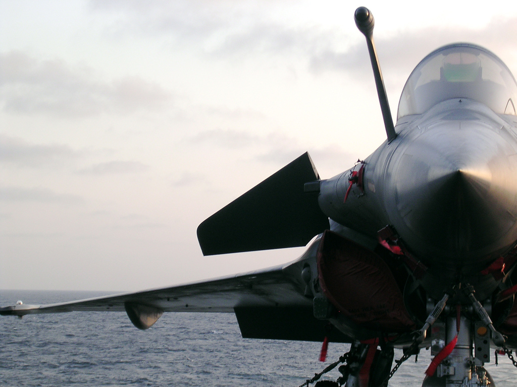 Rafale sur le pont d'envol du porte avions Charles de Gaulle au lever du jour